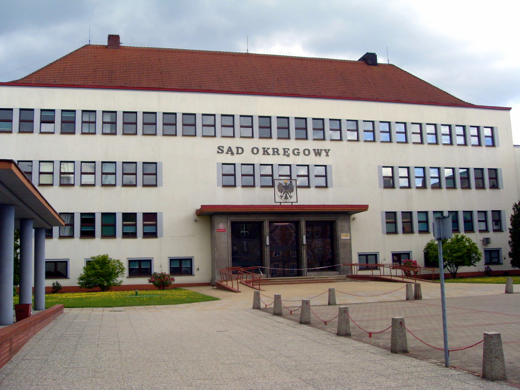 Sąd Okręgowy w Koszalinie, ul. Andersa 34.